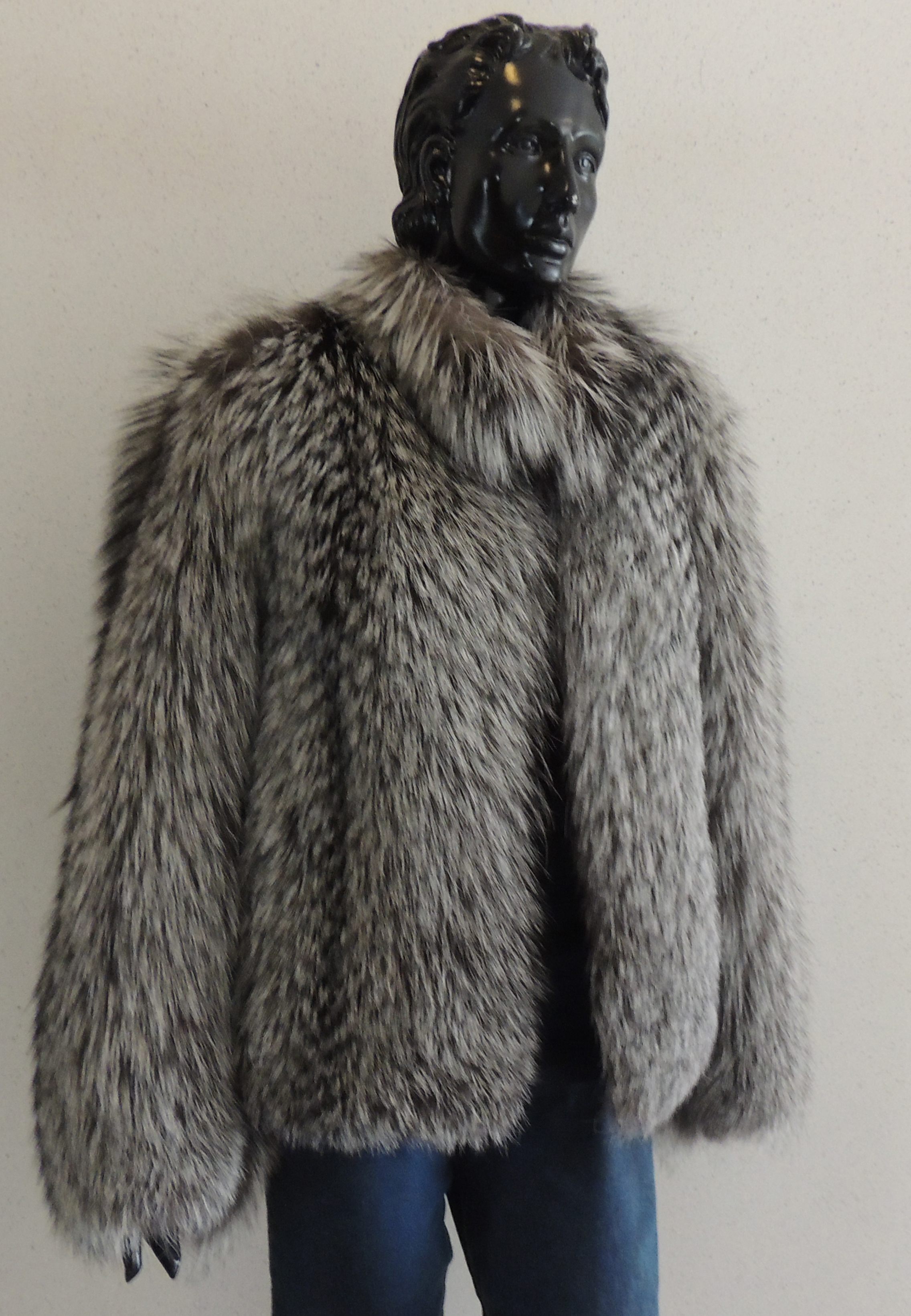 Jacke aus drei luftgalonierten Silberfuchsfellen